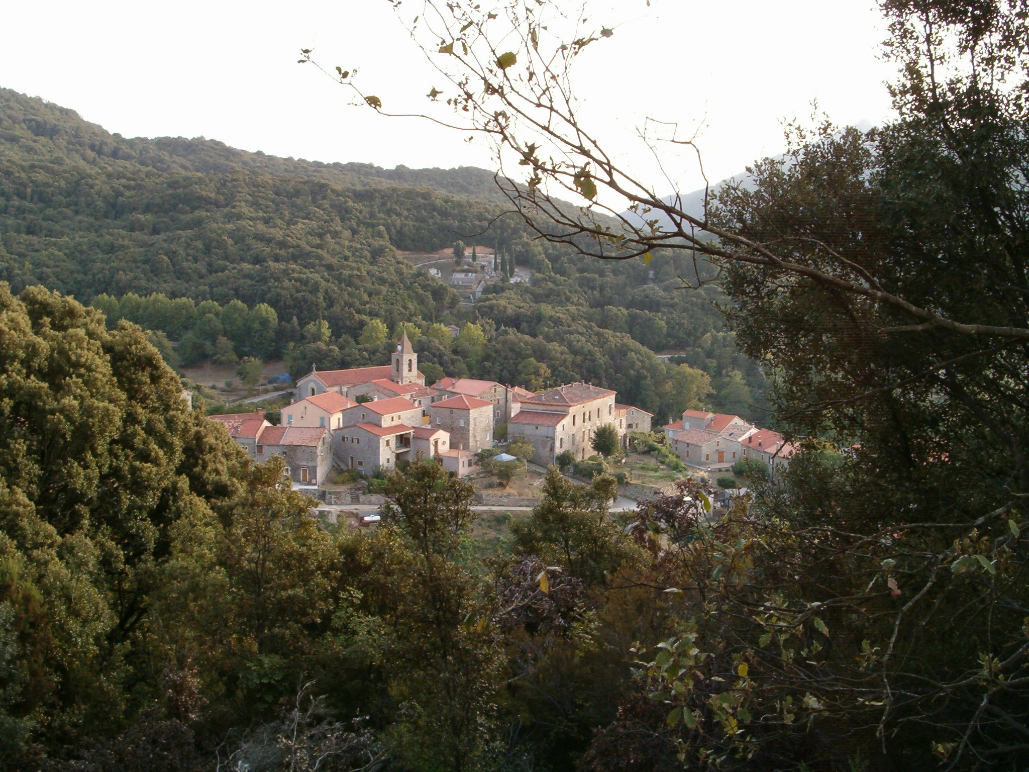 le village de CASALABRIVA